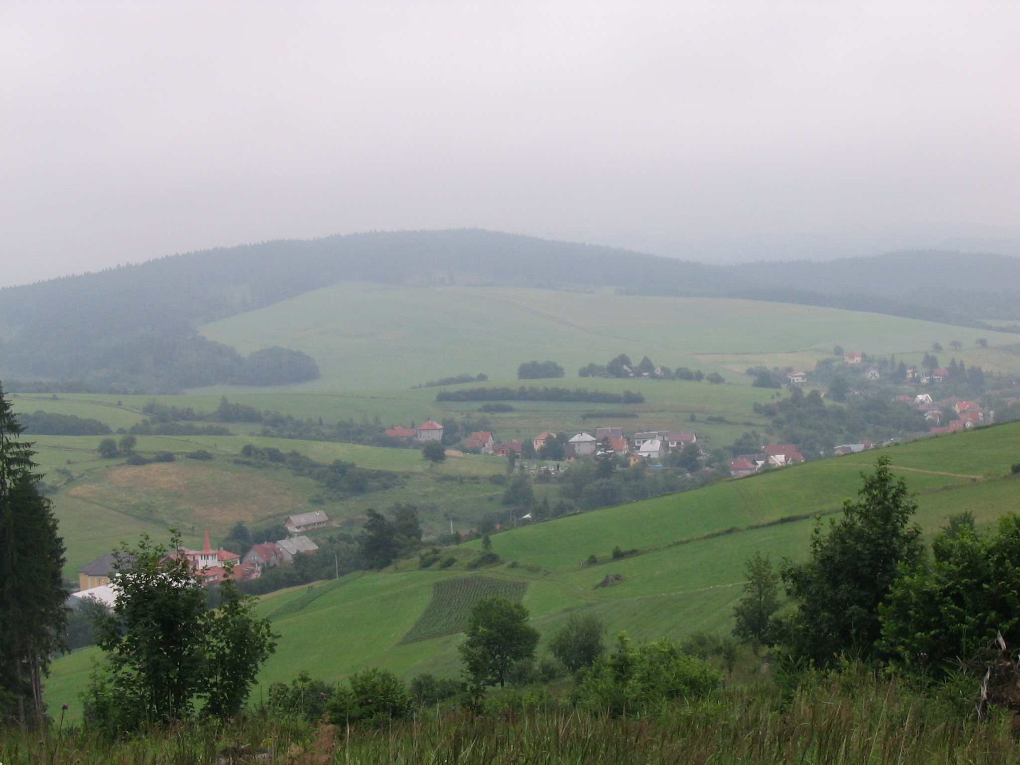 Kateřinice